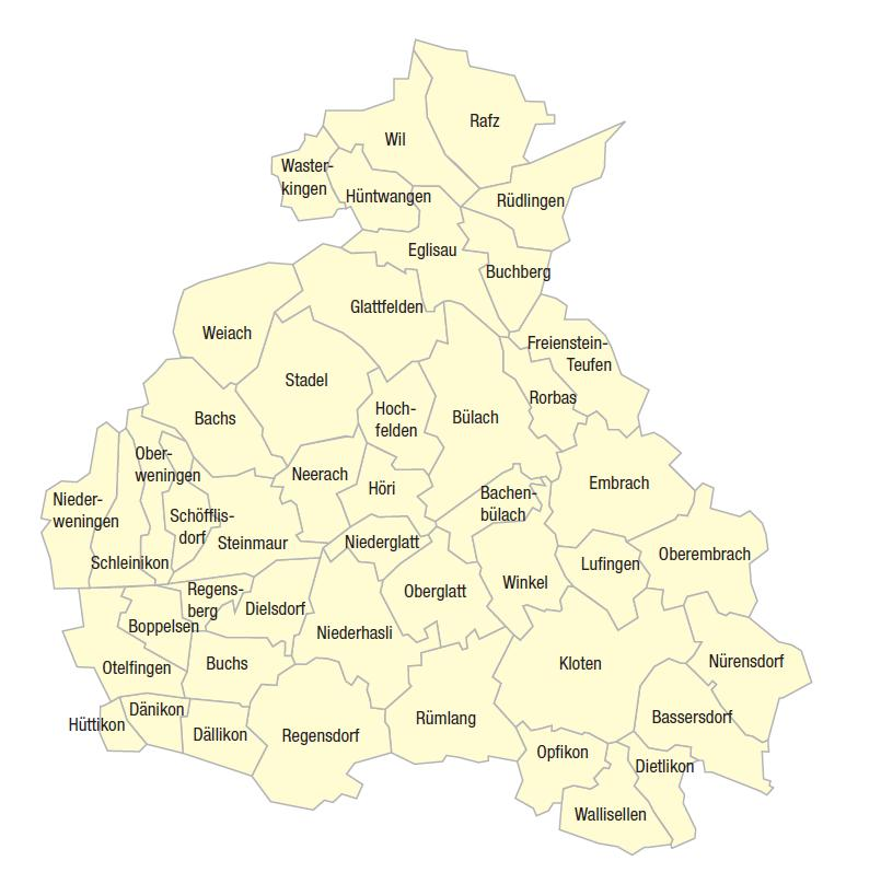 Gebietskarte Zürcher Unterländer